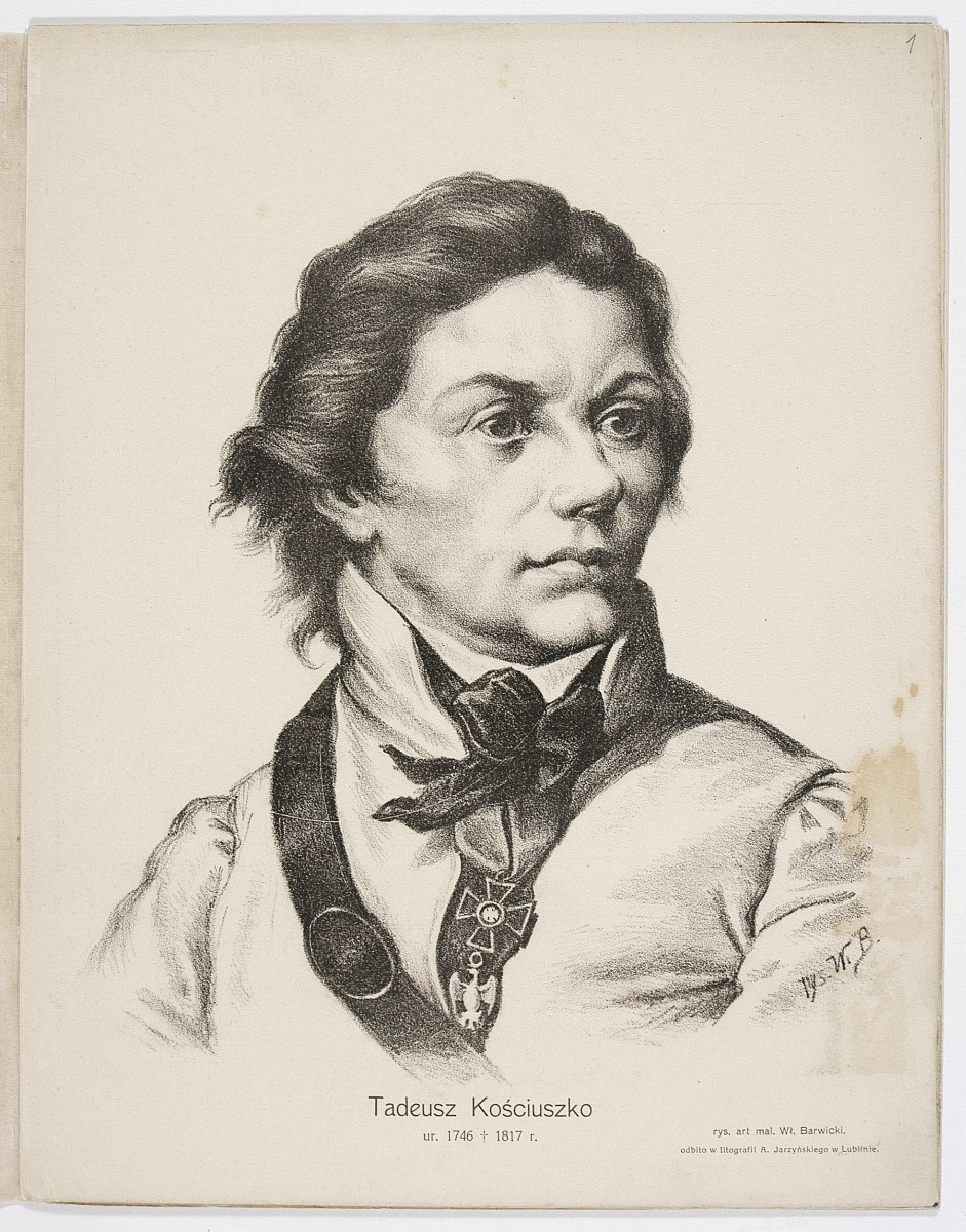 Tadeusz Kościuszko portrait from CBN Polona